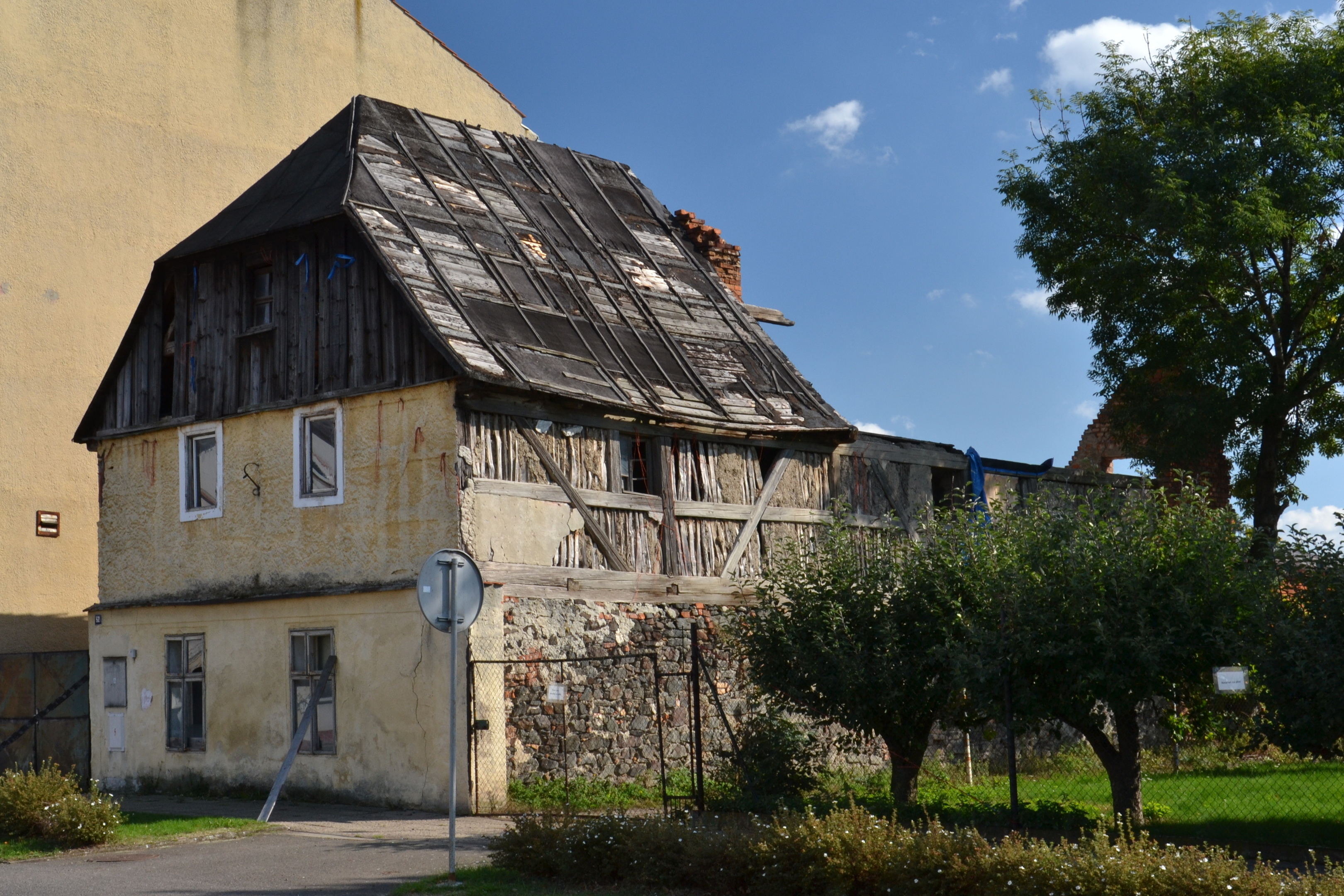 Venkovská usedlost (Vilémov), Vilémov 52